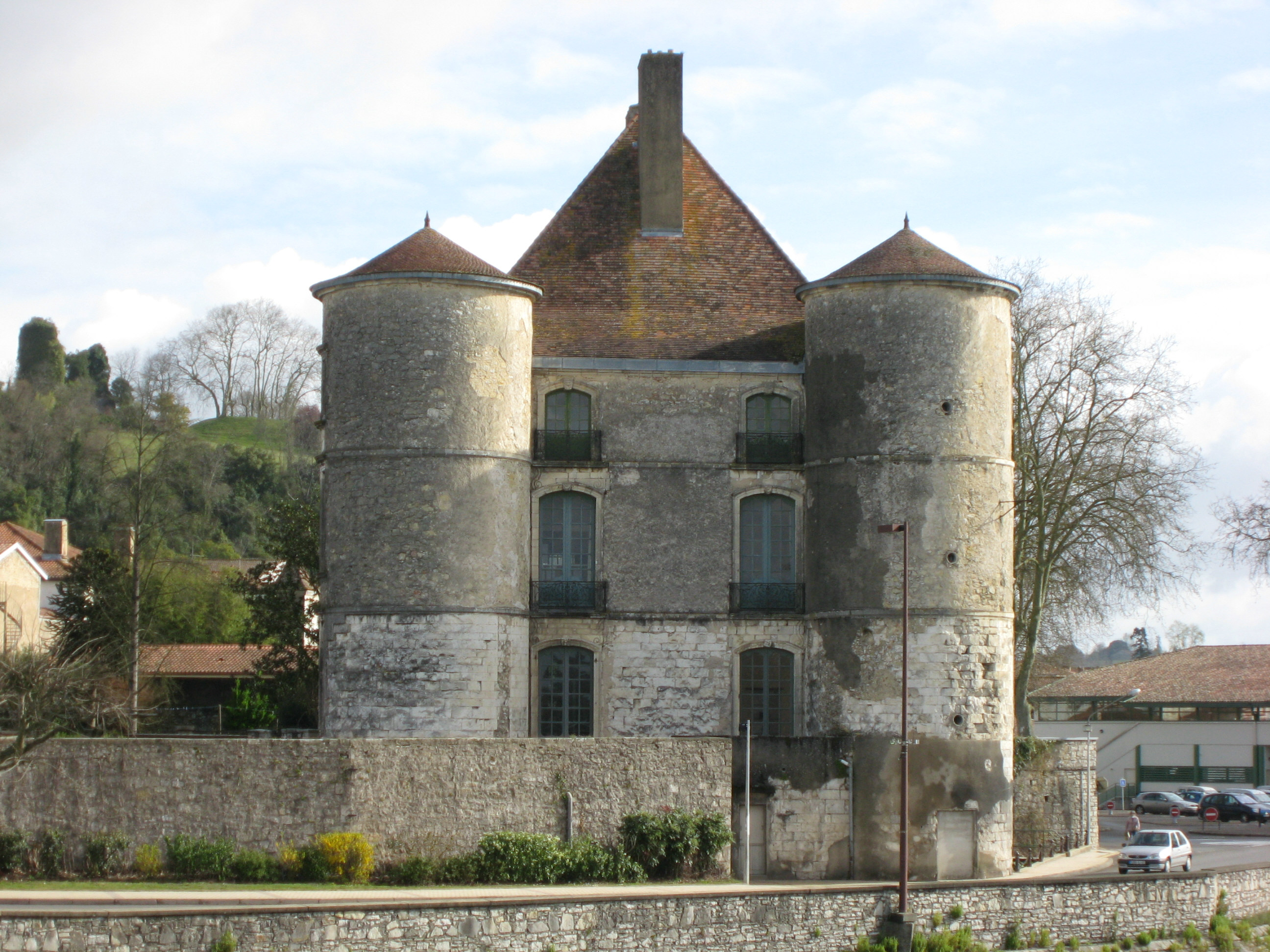 Château de Montréal, Peyrehorade (Landes)(Pyrénées-Atlantiques) (Pyrénées).